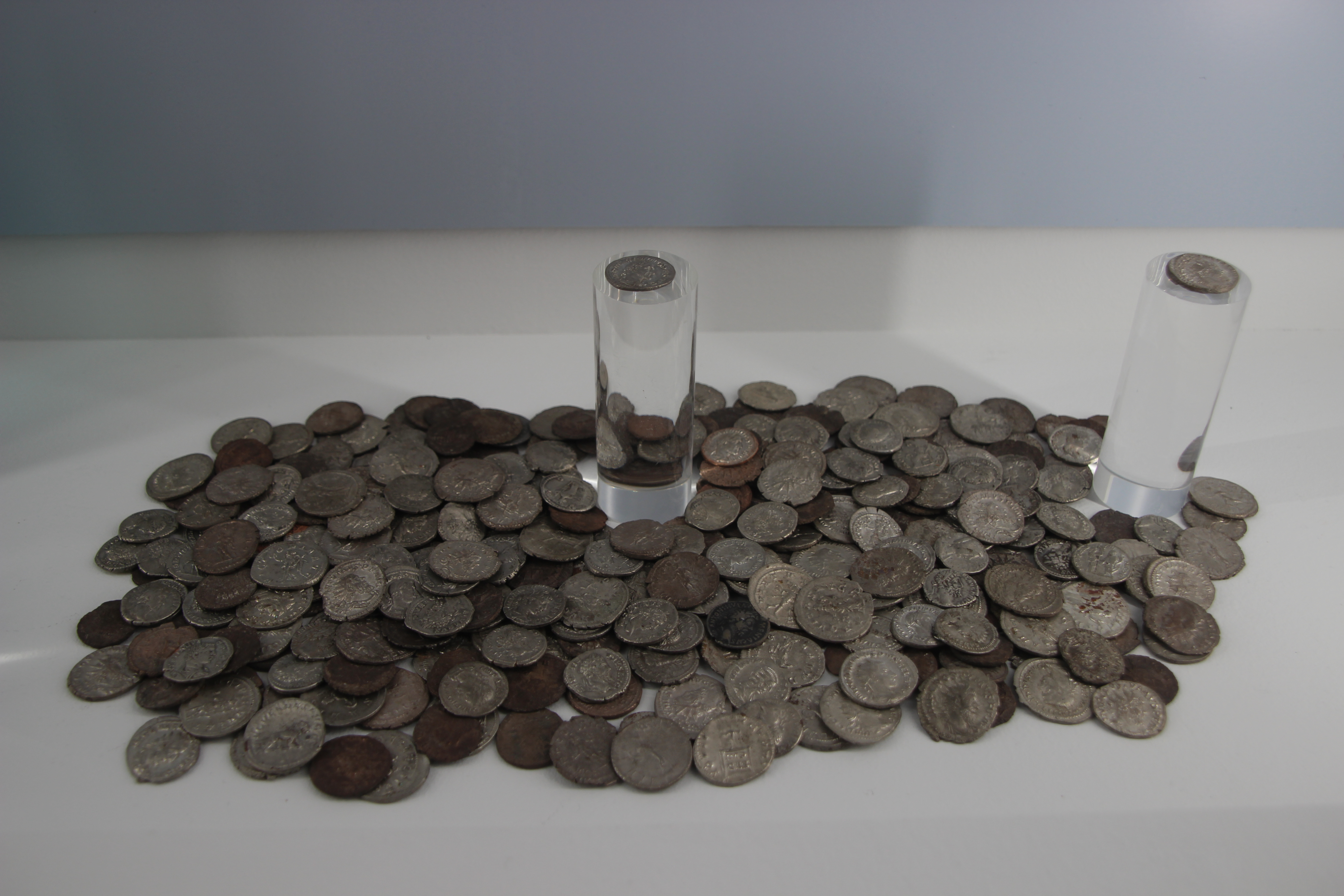 Trésor de Tourouvre 1